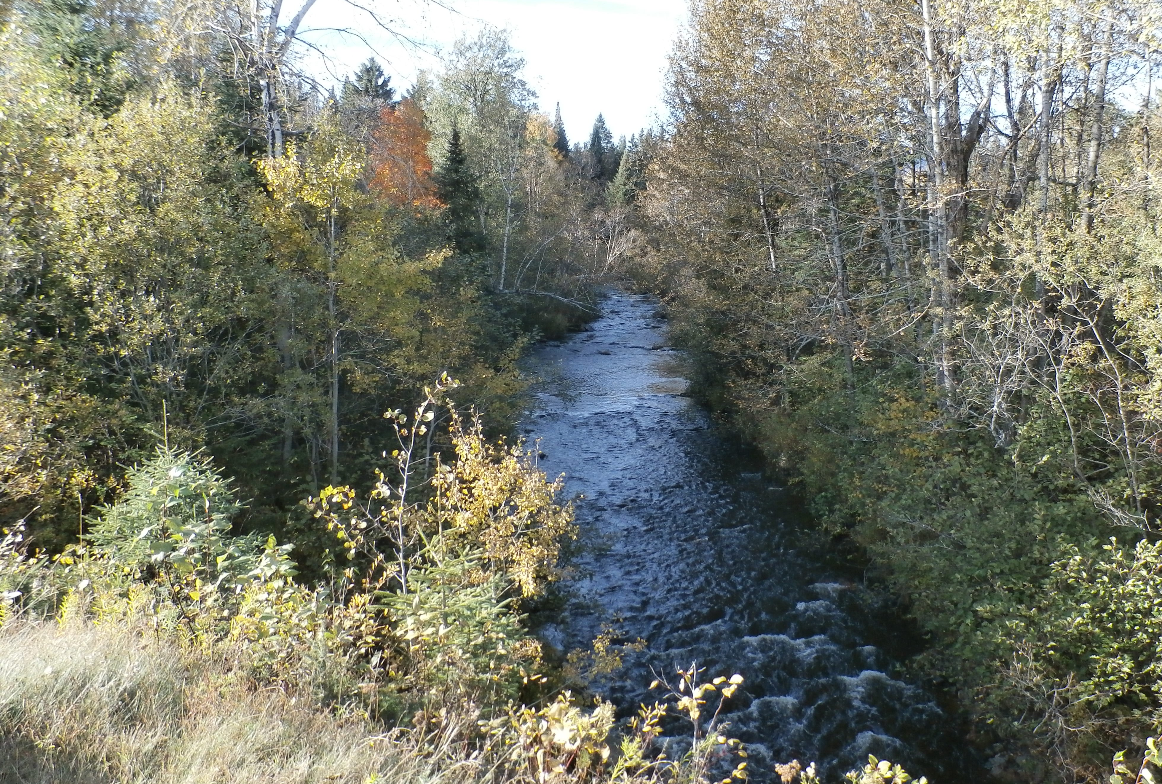 Rivière Chesham, Route 212 entre La Patrie et Notre-Dame-des-Bois.